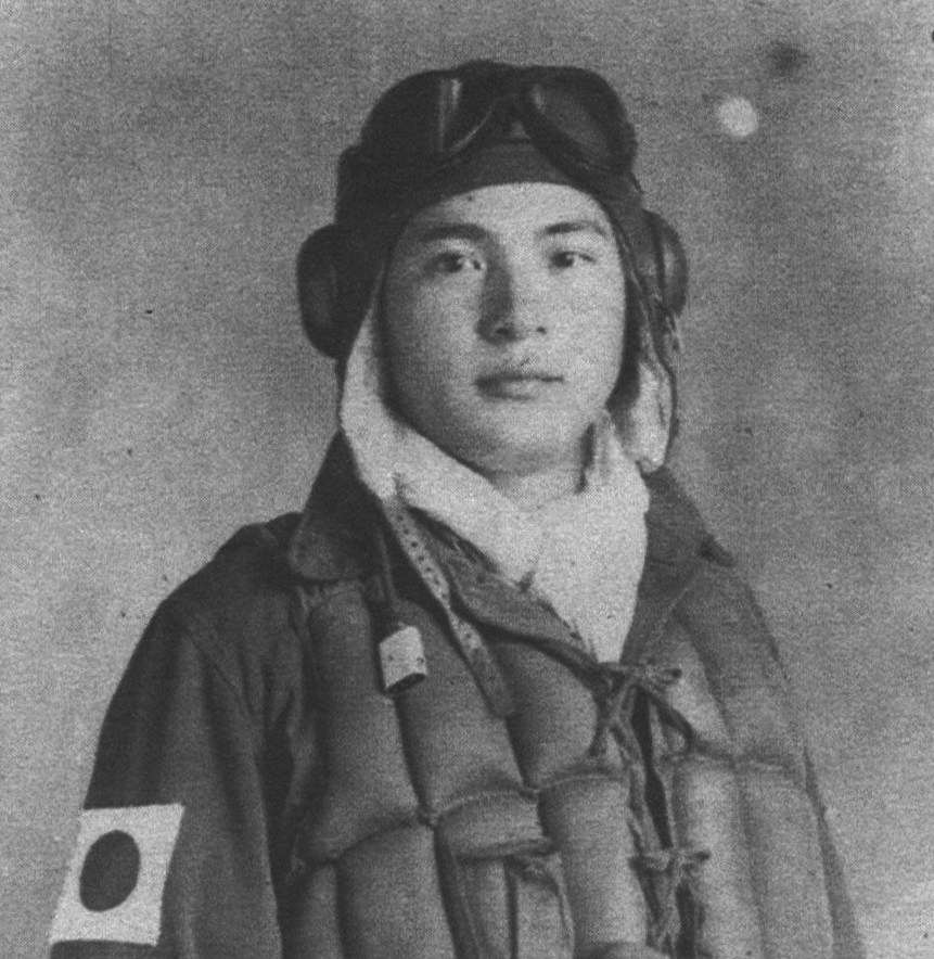 1945年終戦直後に台中で撮影された角田和男